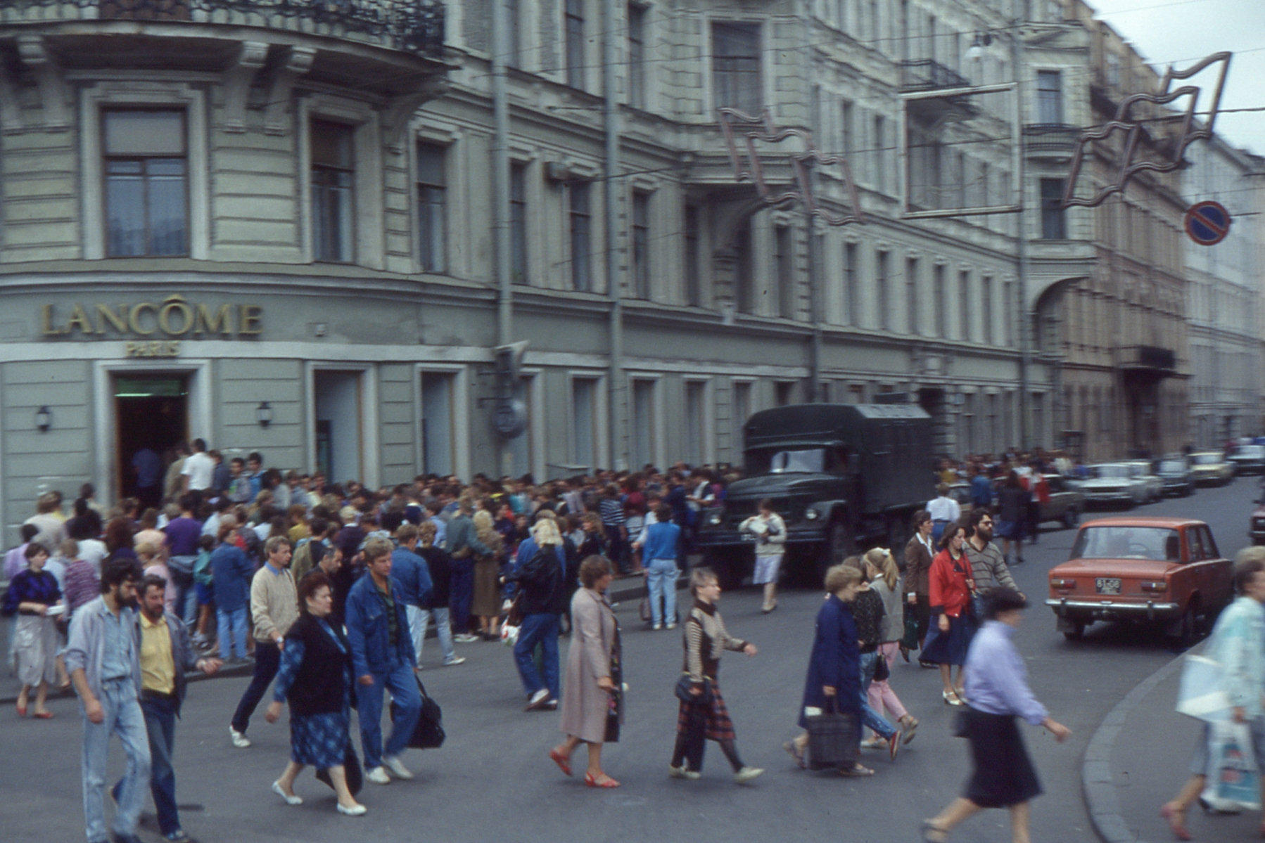 Leningrad 1991